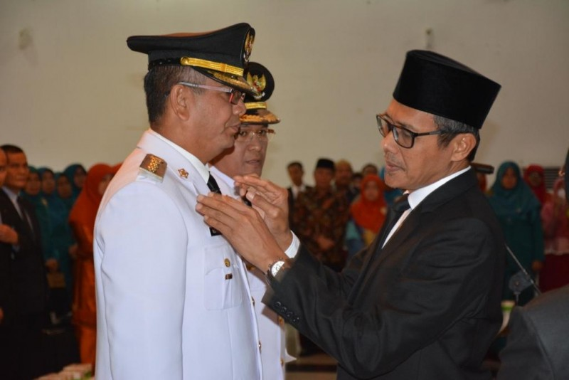 Irwan Prayitno Ingatkan Wali Kota Payakumbuh Untuk Jaga Harmonisasi